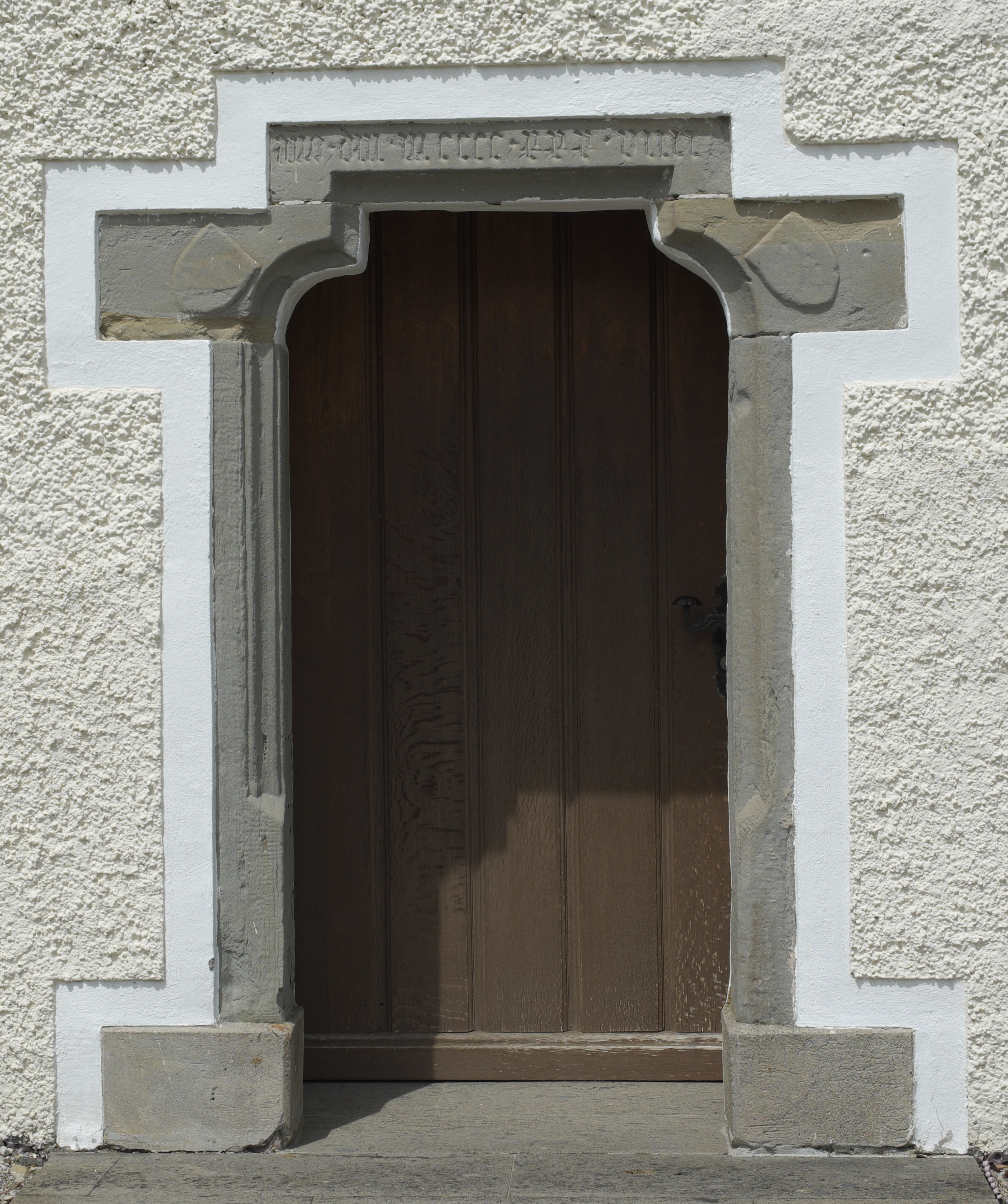 Katholische Filialkirche St. Leonhard in Ittelsburg, einem Ortsteil von Bad Grönenbach im Landkreis Unterallgäu (Bayern/Deutschland), Eingangstür